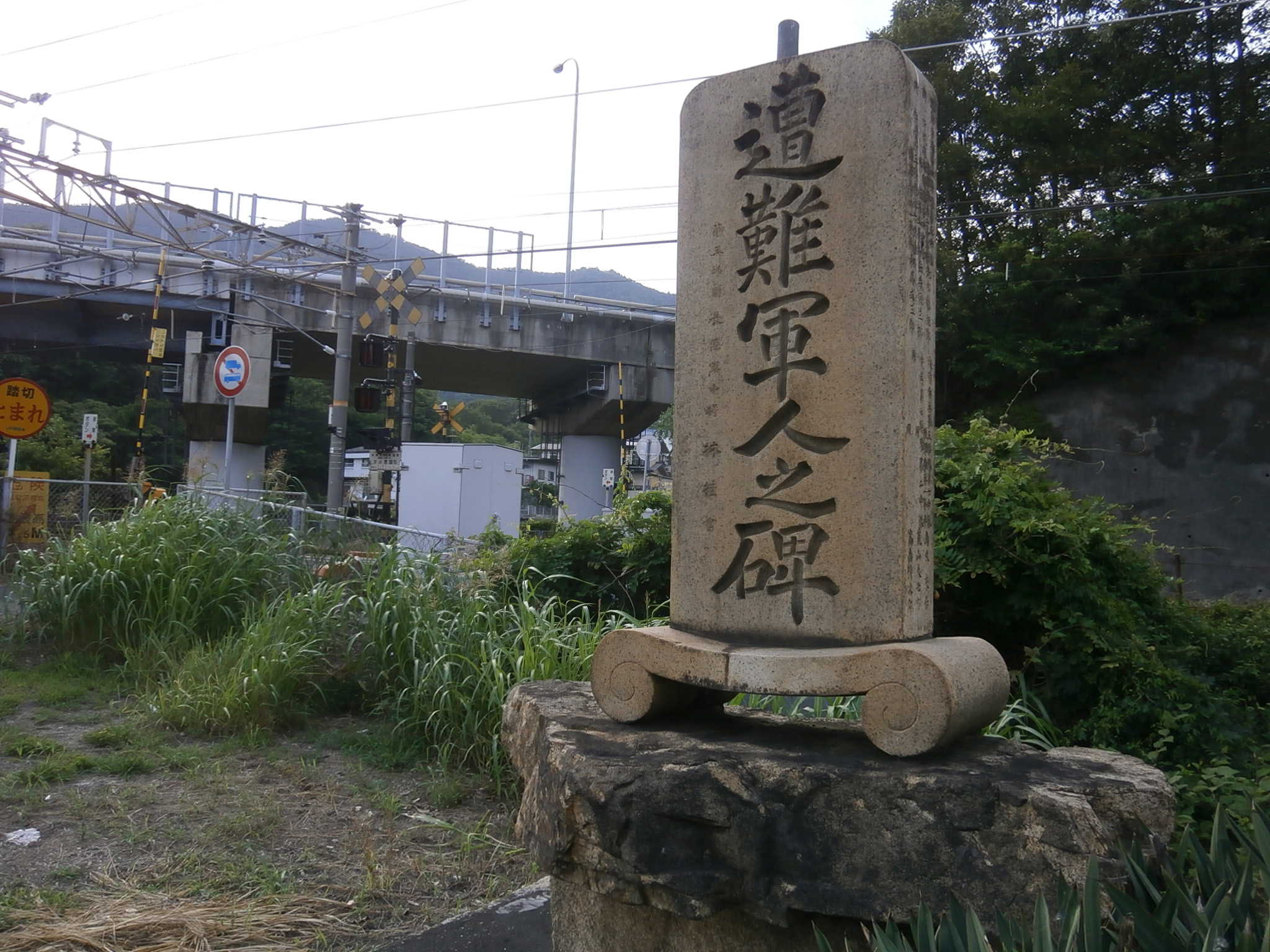 広島県尾道市にある1894年に発生した山陽鉄道軍用列車事故の慰霊碑。建立当時の日本陸軍第五師団長の林桂の揮毫による慰霊碑